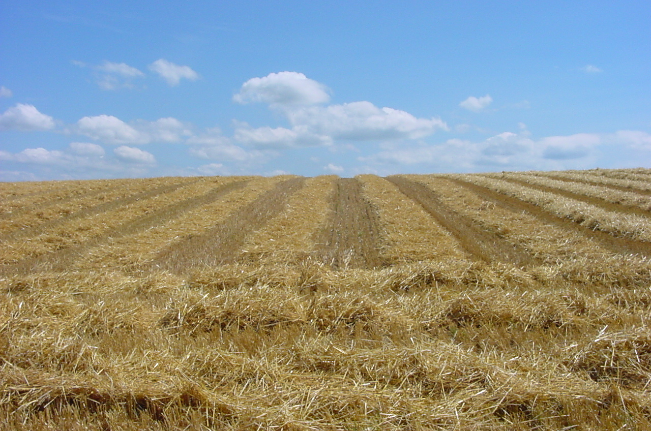 Gemähtes Kornfeld im Herbst Mont Vully Fribourg (CH)